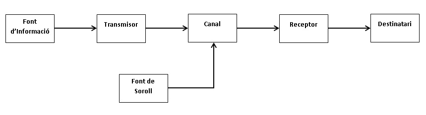 ESQUEMA MODEL COMUNICACIÓ SHANNON